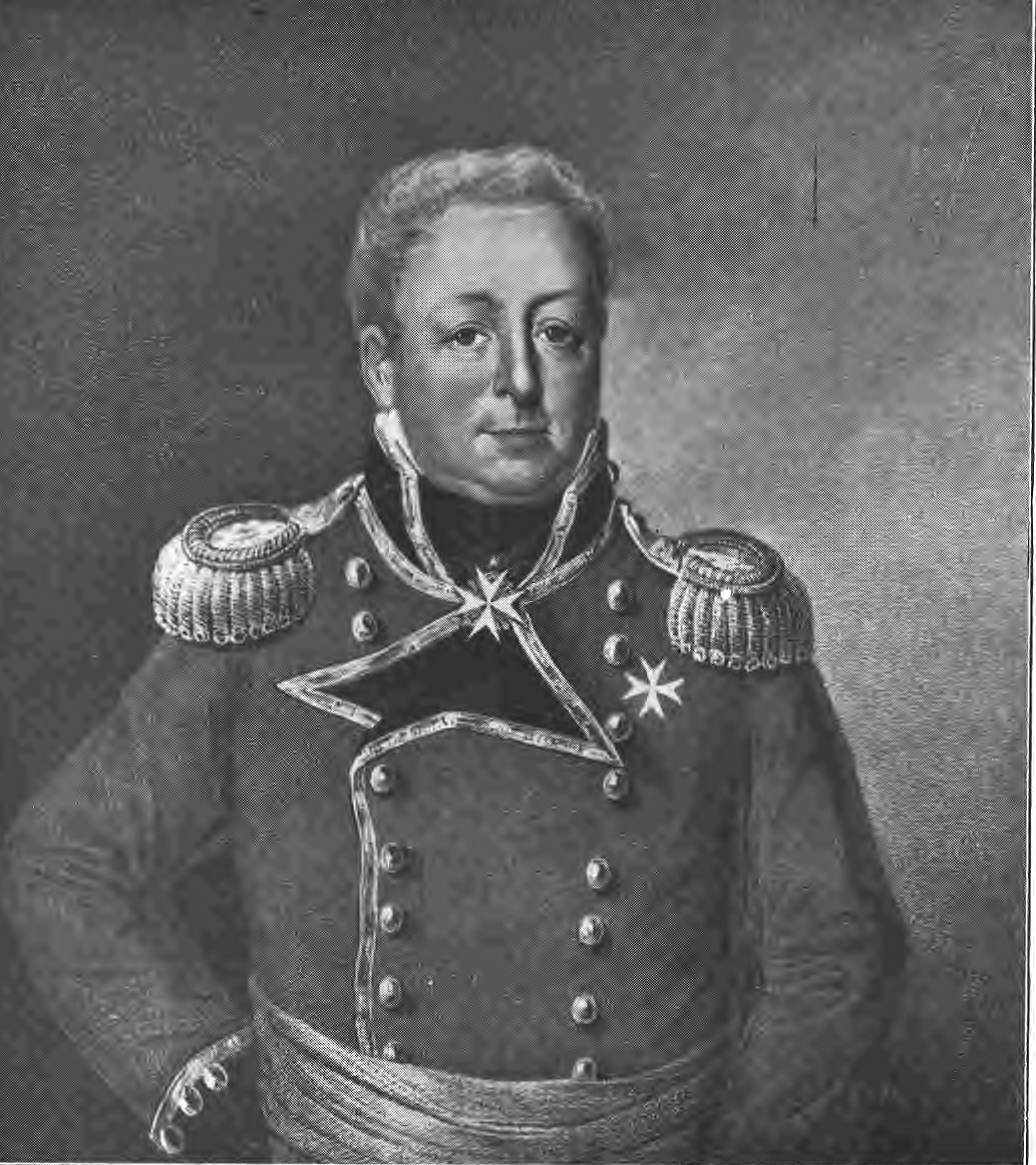 Porträt von Hartwig Johann Christoph von Hedemann; es befand sich vor 1919 auf Schloss Oldershausen, Verbleib unbekannt